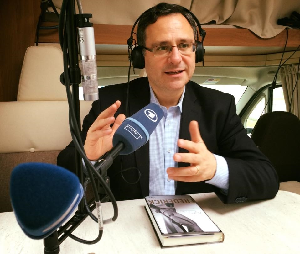 Perikles Monioudis beim Hörfunk-Gespräch im mobilen ARD-Studio (Leipziger Buchmesse 2016) über seinen damals gerade erschienenen Roman "Frederick" (dtv).